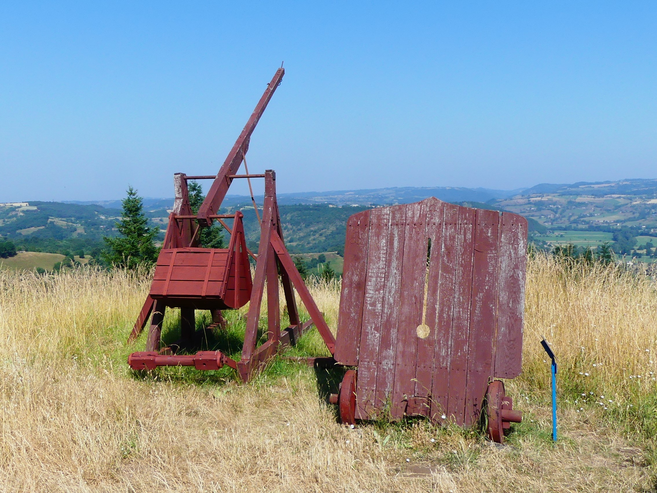 Un trébuchet (à gauche) et un mantelet, château de Calmont d'Olt, Espalion, Aveyron, France.